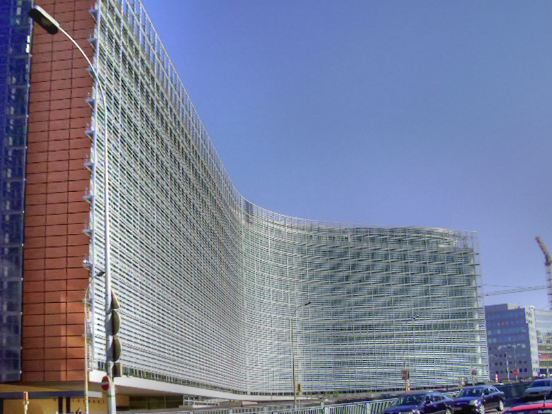 Budova Berlaymontu v Bruselu na náměstí Schuman